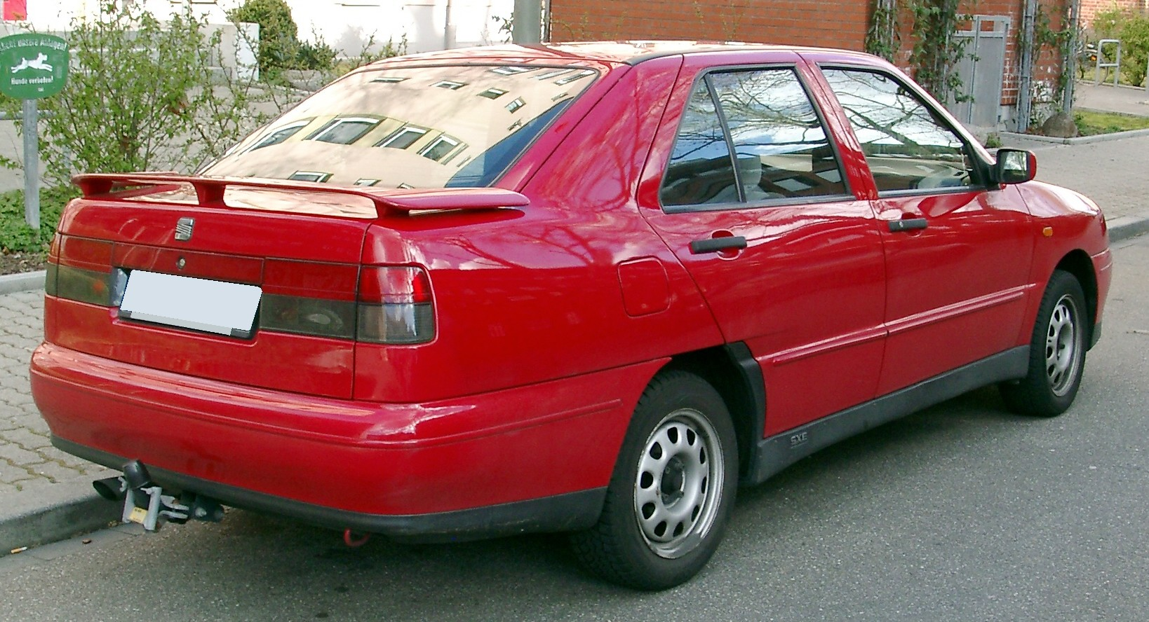 Seat Toledo, 1. Generation